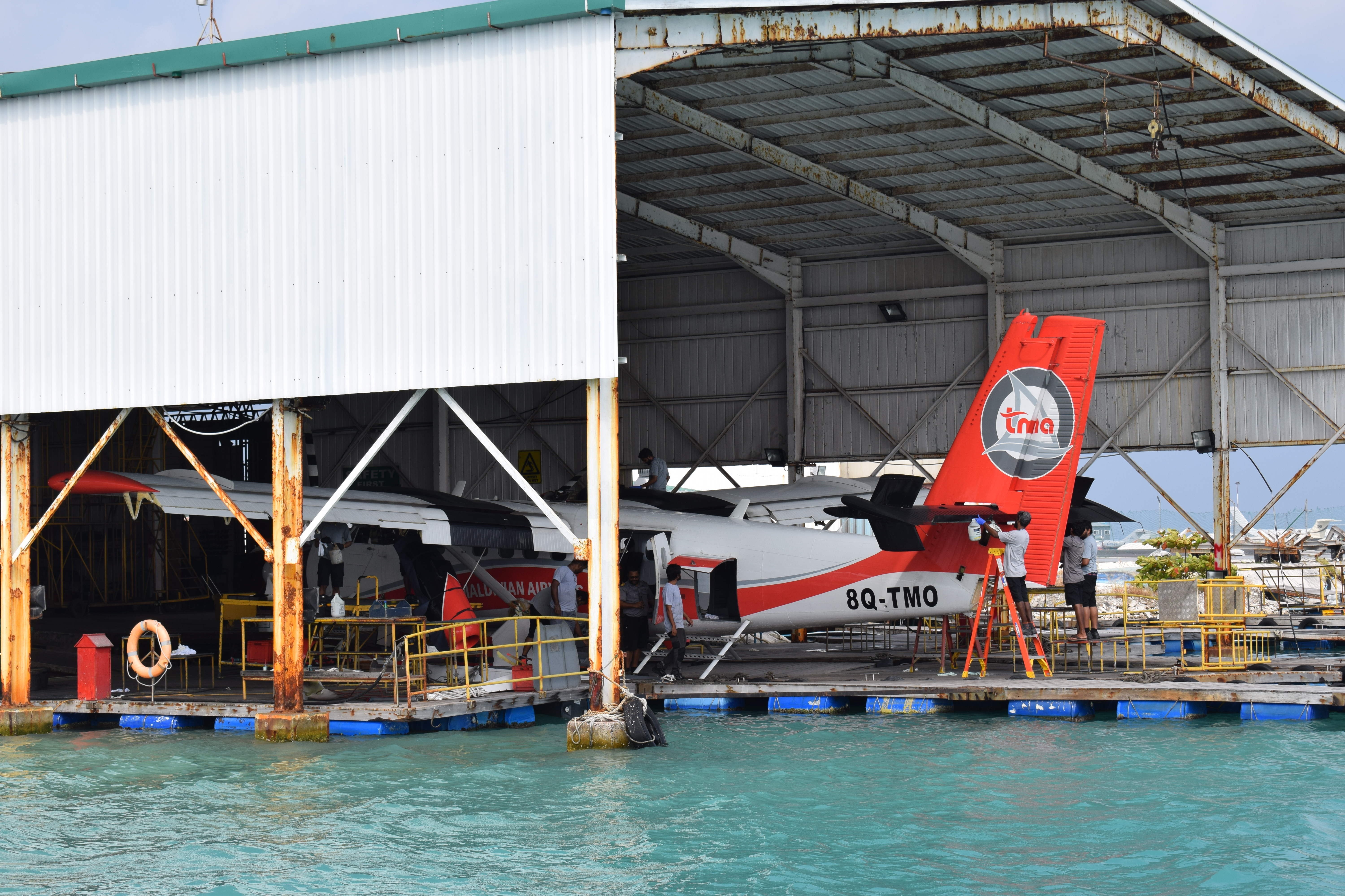 8Q-TMO